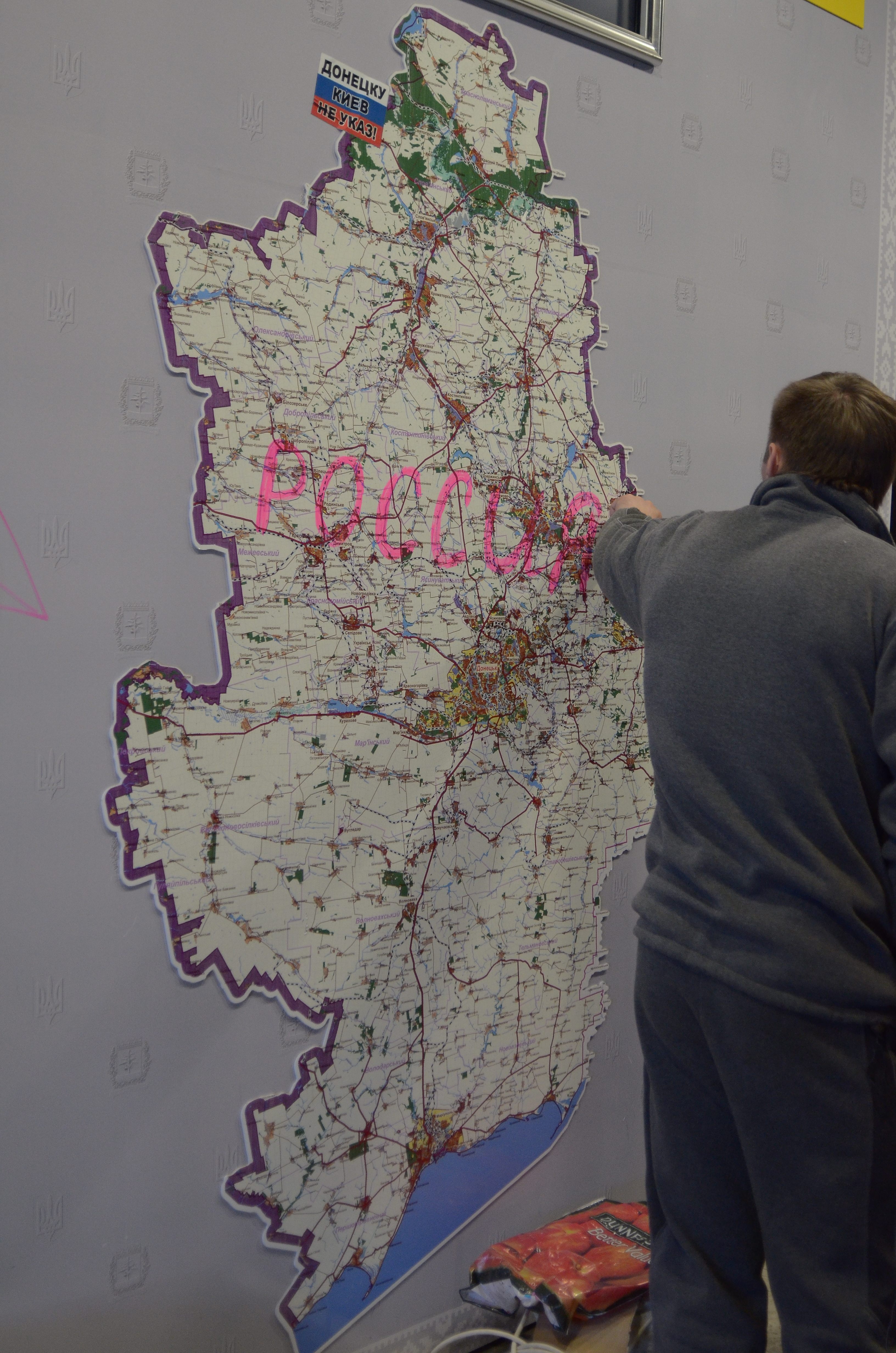 Протесты в Донецке